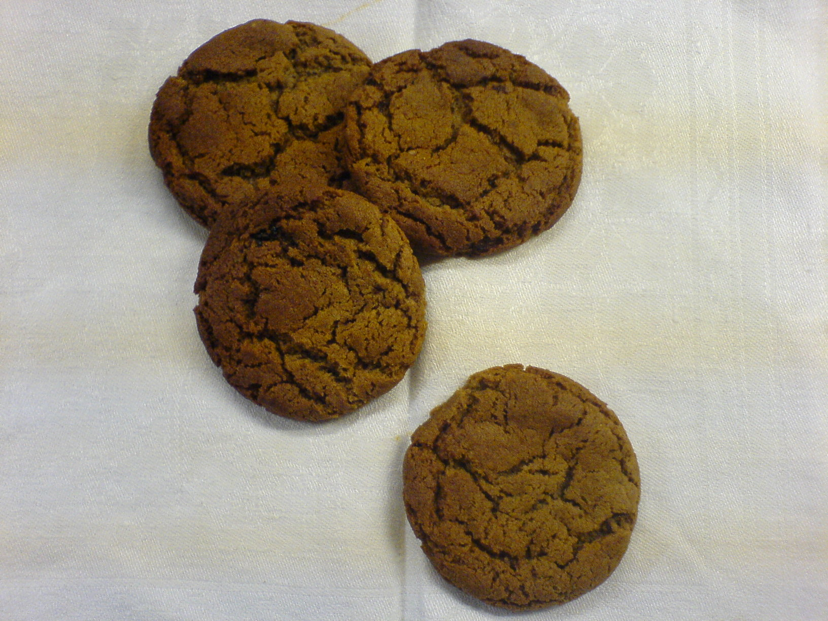 Ginger biscuits (cookies)